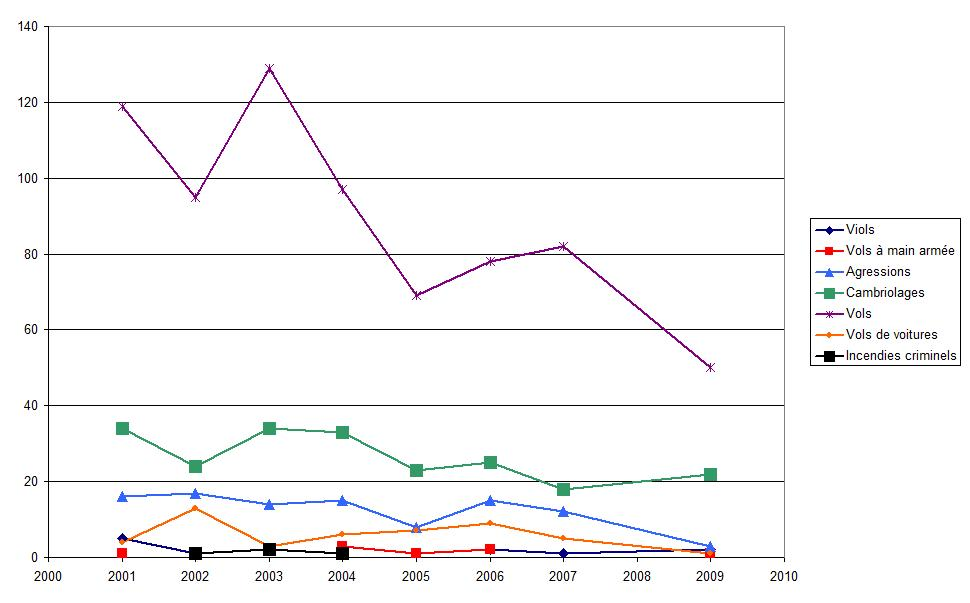 Ciminalité à Hartford (Michigan, Etats-Unis).